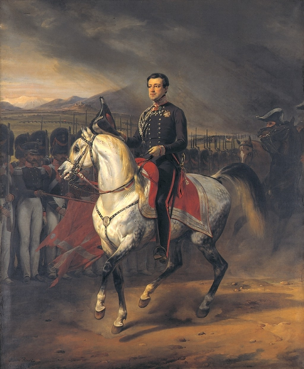 Carlo Alberto ritorna in Piemonte nel 1824